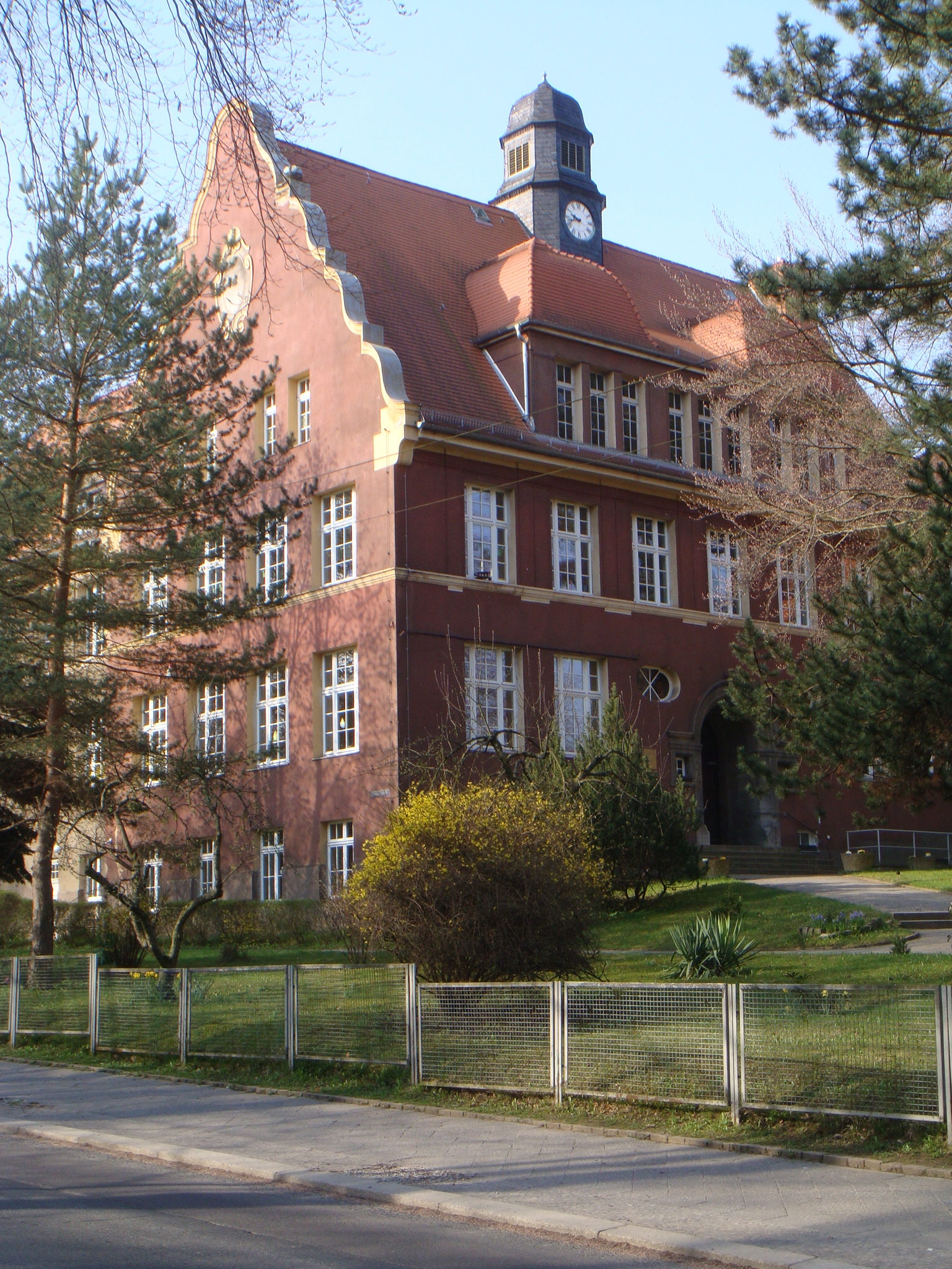 Grundschule_am_Schötener_Grund